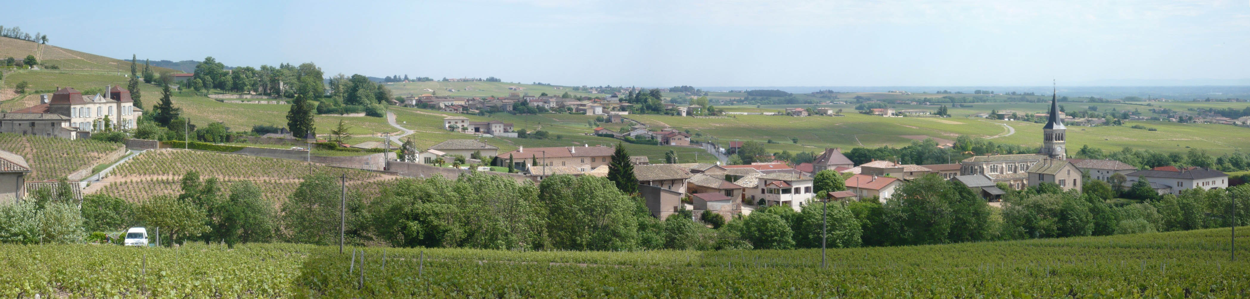 Panorama de Chénas (Rhône) en 2009.